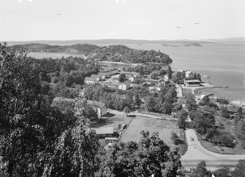 utsikt, Nedre Bekkelaget skole, veier, bebyggelse, sund, øyer, fjord. Fotografering:1961Fotograf: Teigen, Truls.